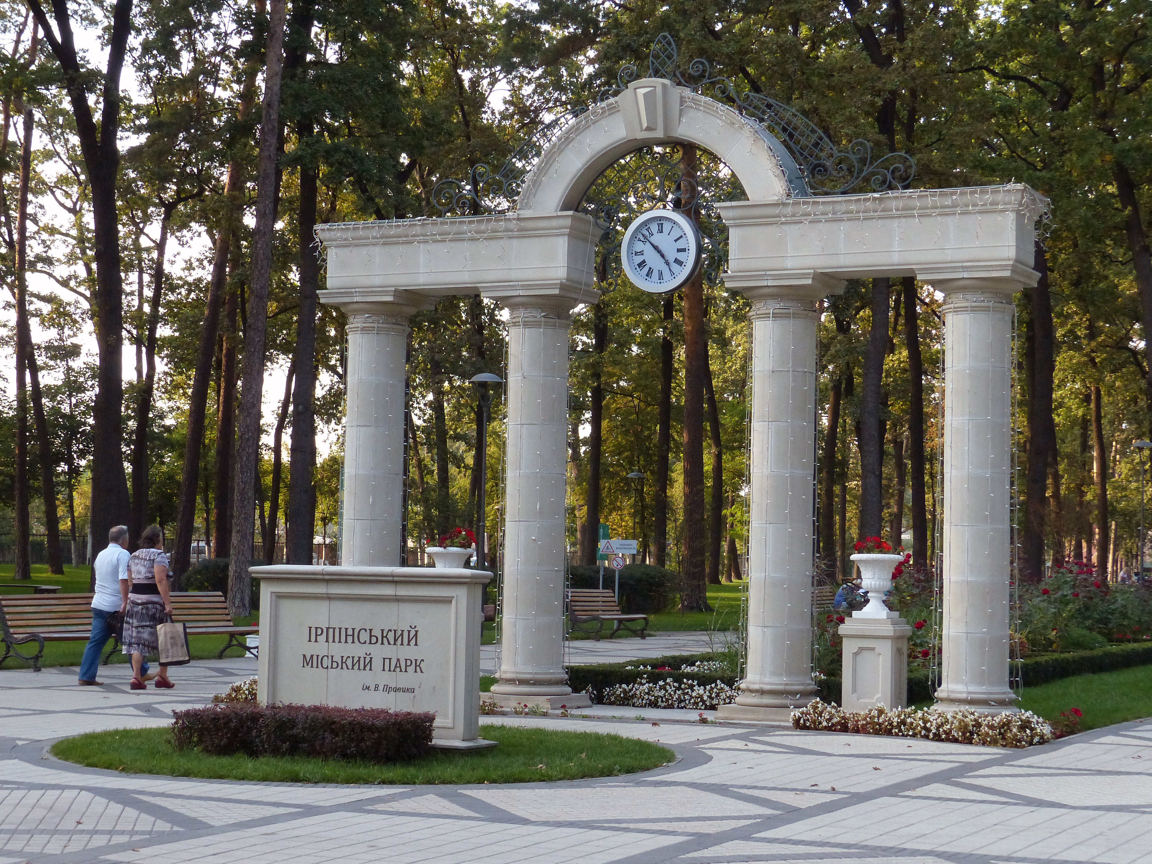 Парк імені Правика в Ірпені